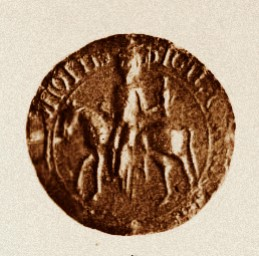 Péronnelle de Chambon, sceau du XIIème siècle - règne de Guy II d'Auvergne.